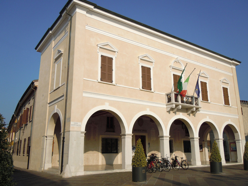 Castel Goffredo, Palazzo comunale o della Ragione.